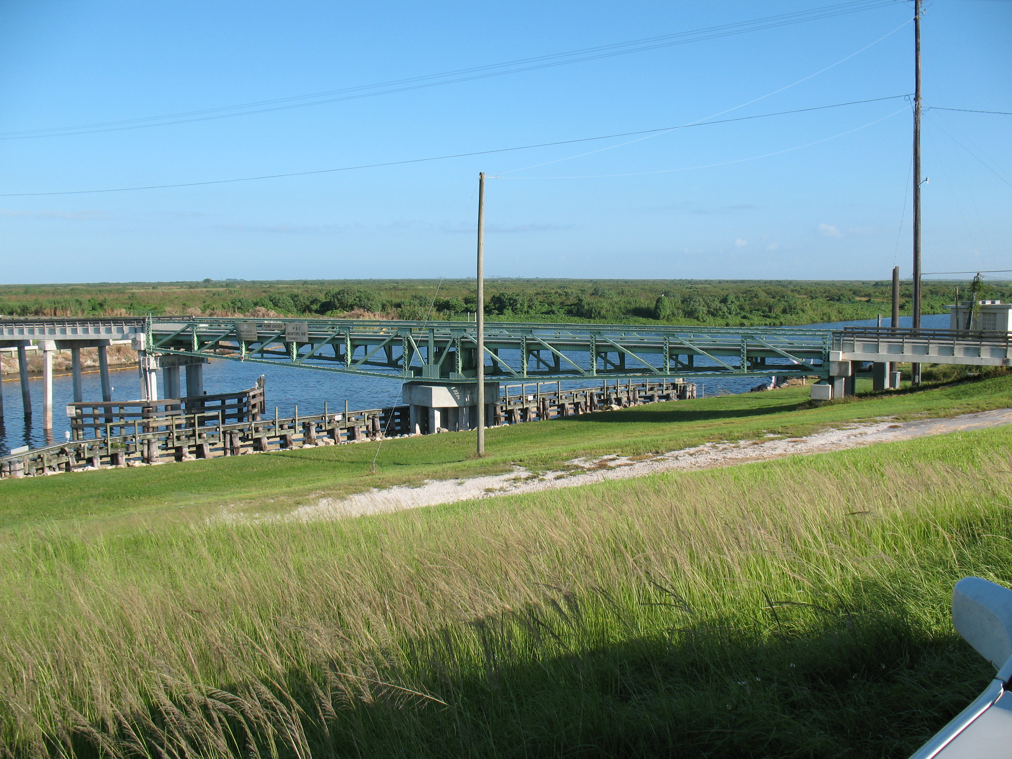 A spinning drawbridge near Belle Glade, Florida.